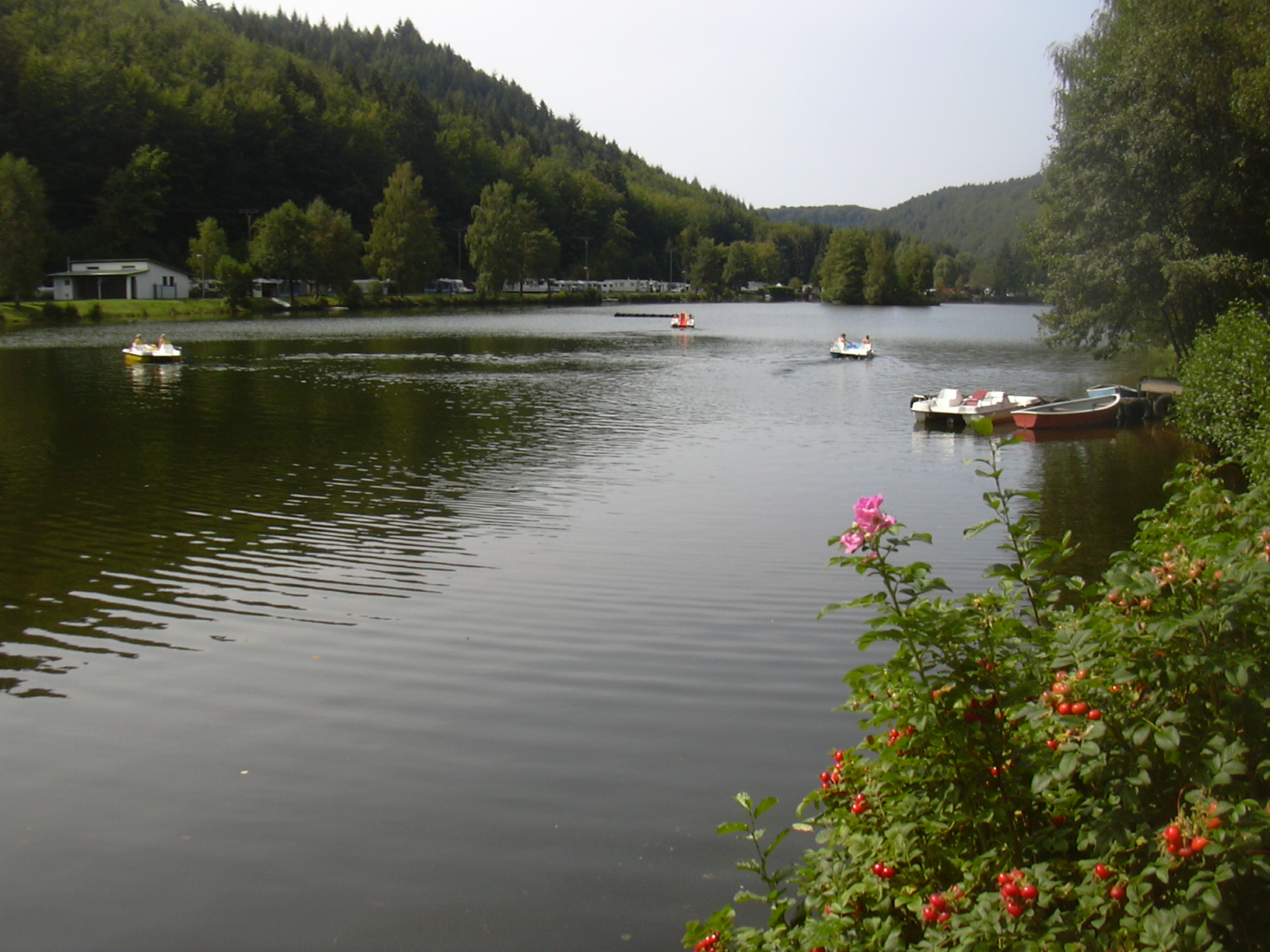 Clausensee (lake near Waldfischbach-Burgalben / Palatinate, Germany